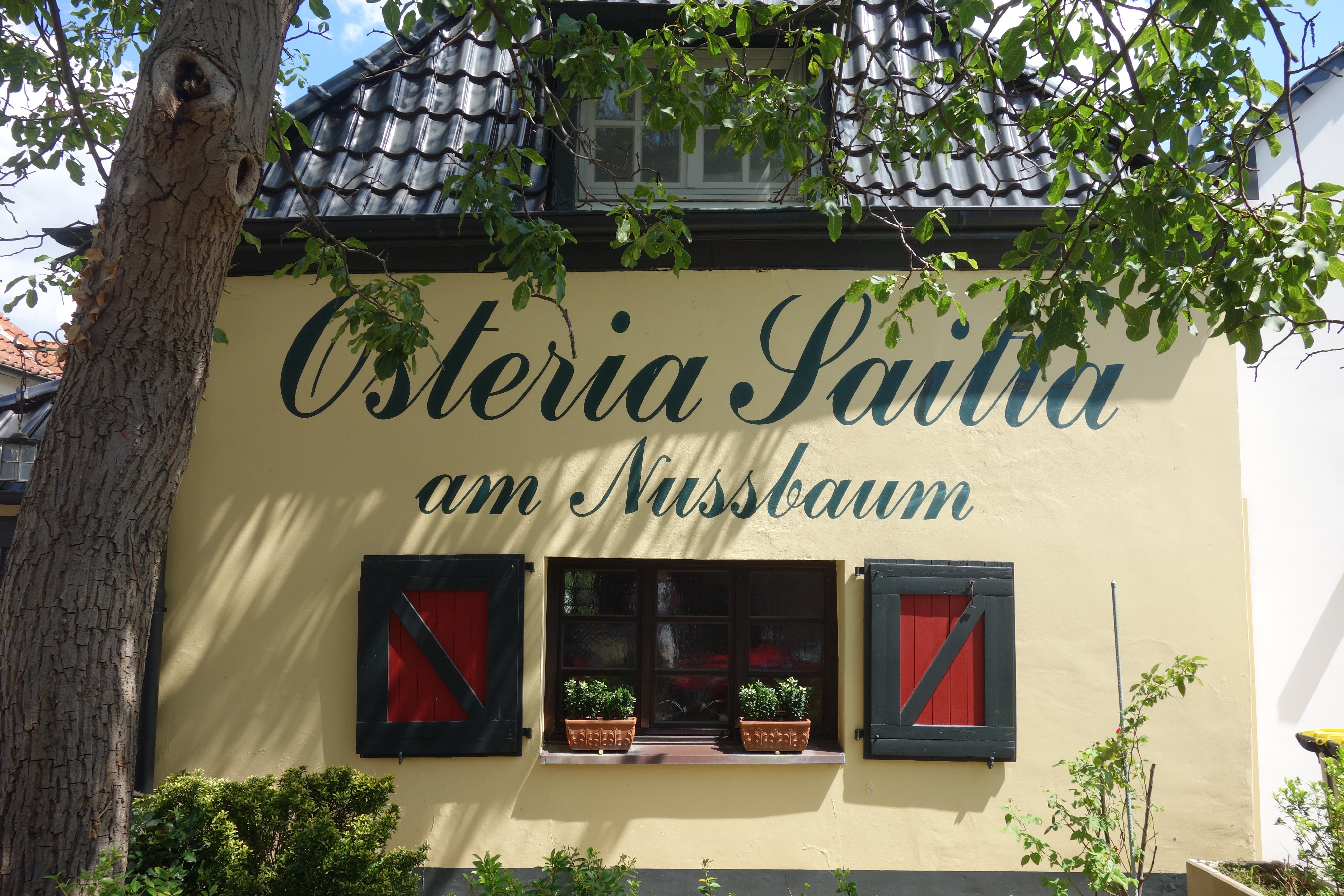 Gaststätte „Osteria Saitta am Nussbaum“ (ehemals Café am Nussbaum)“ in Alt-Niederkassel 32, Düsseldorf-Niederkassel